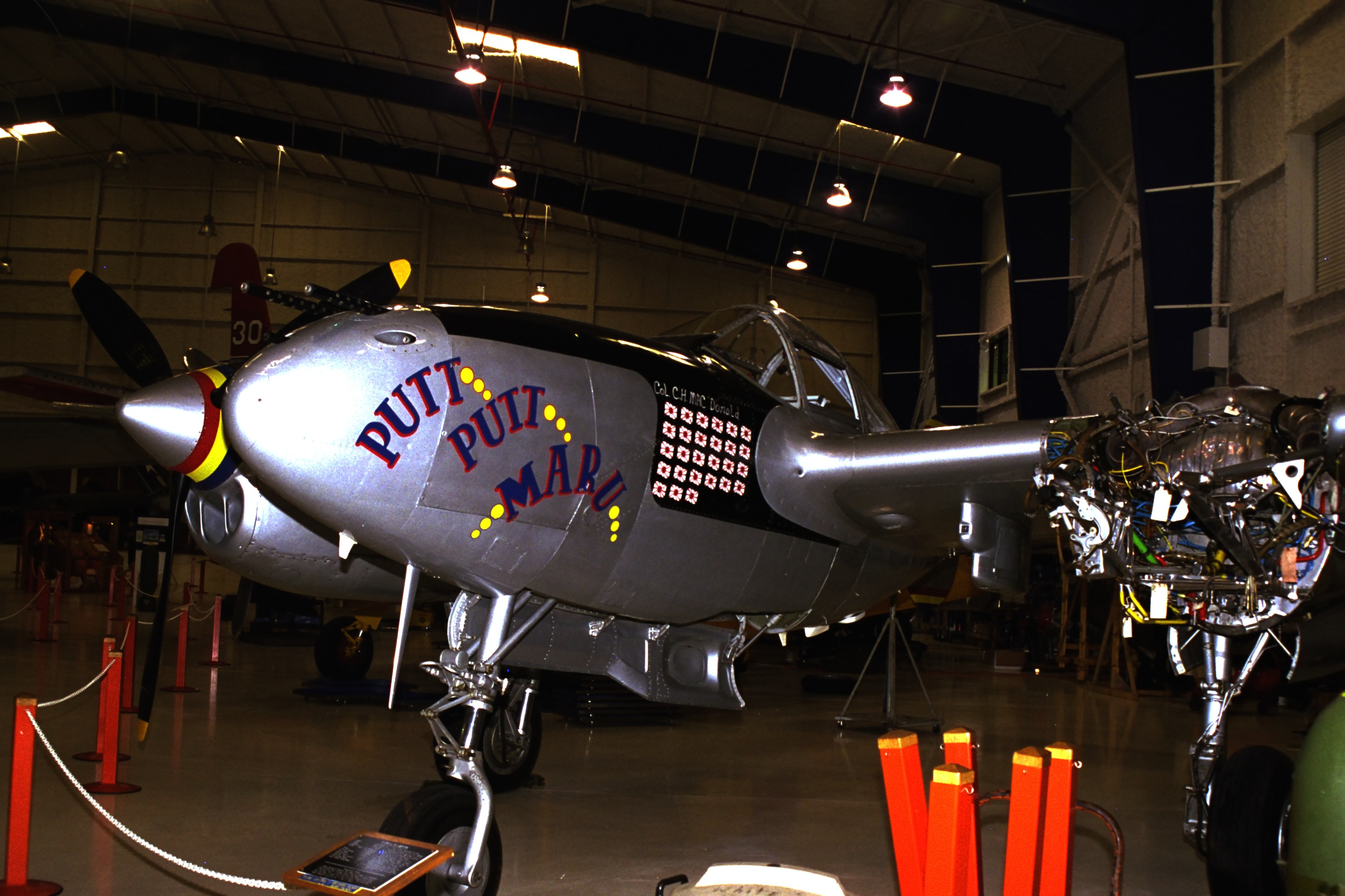 Lone Star Flight Museum